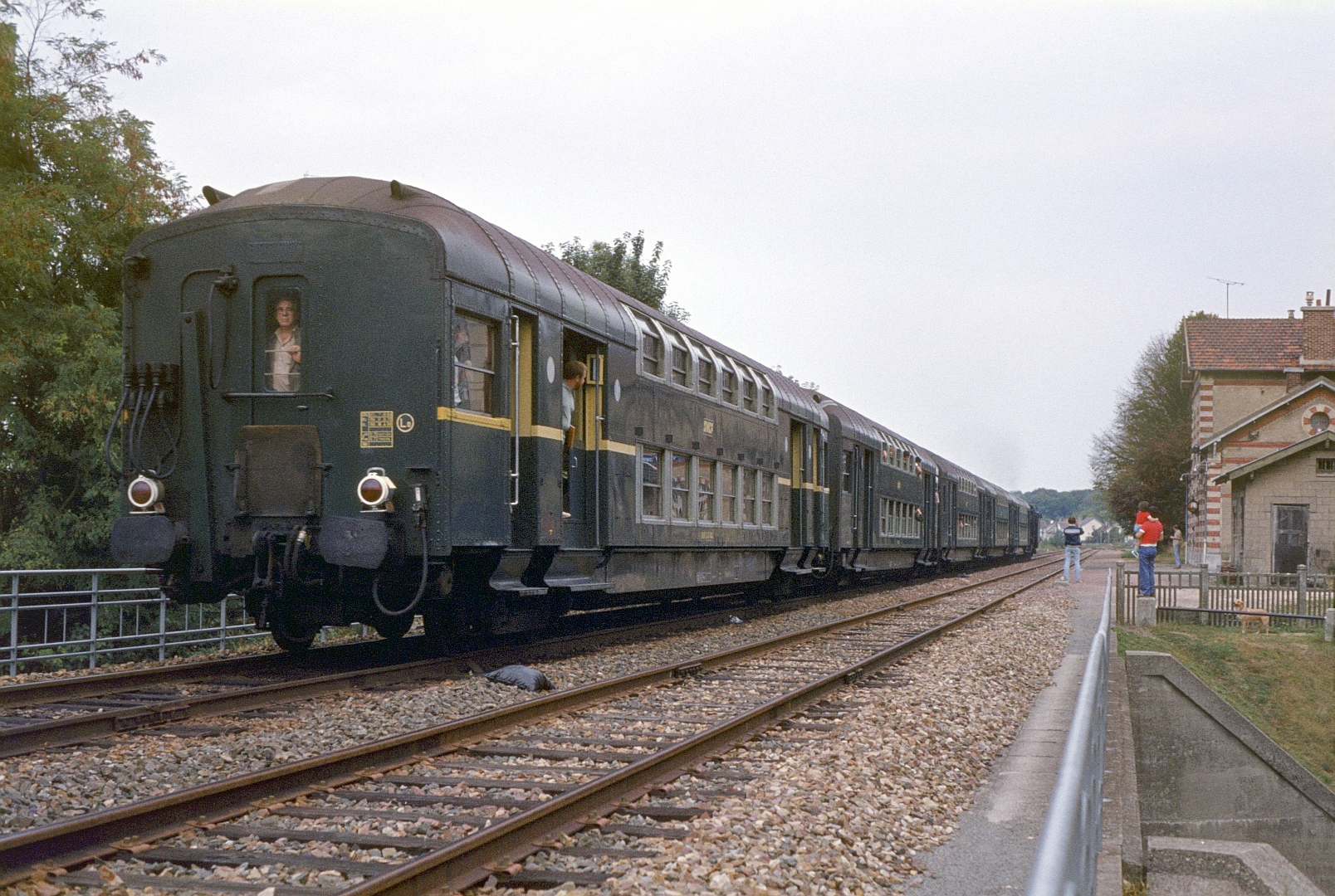 Un train spécial composé de voitures à deux niveaux ex-Etat en gare de Poissy-Grande-Ceinture le 19 septembre 1982.